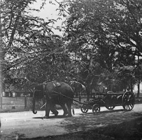 Stereopositief. Militair transport met een olifant